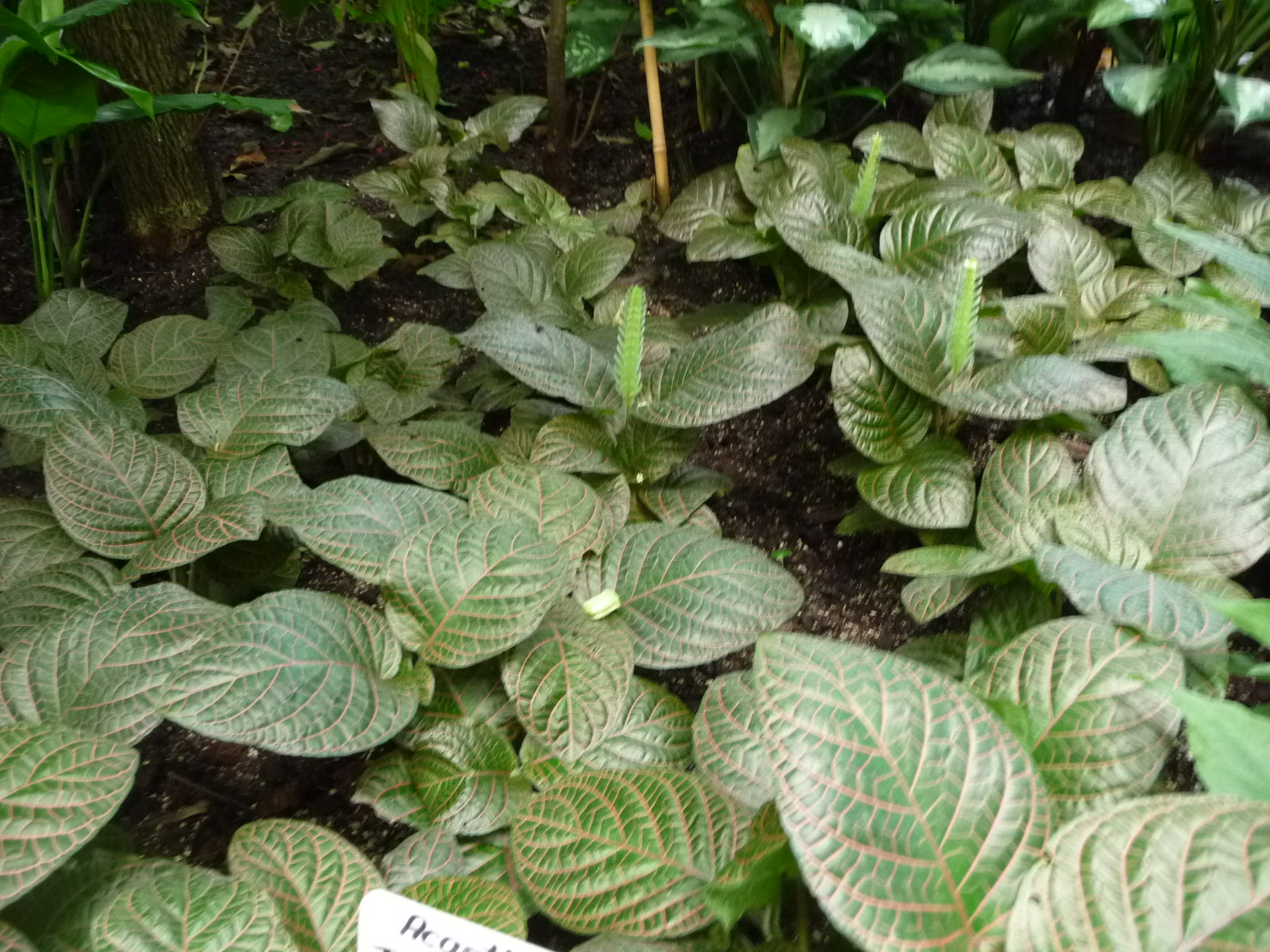 Fittonia verschaffeltii 'Pearcei' (Hamburgi pálmaház)